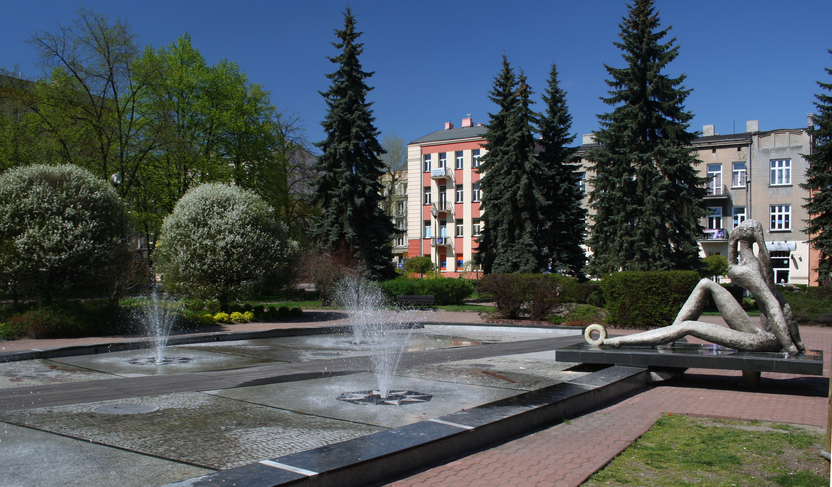 Fontanna, skwer Solidarności w Częstochowie. Projekt: Włodzimierz Ściegienny.